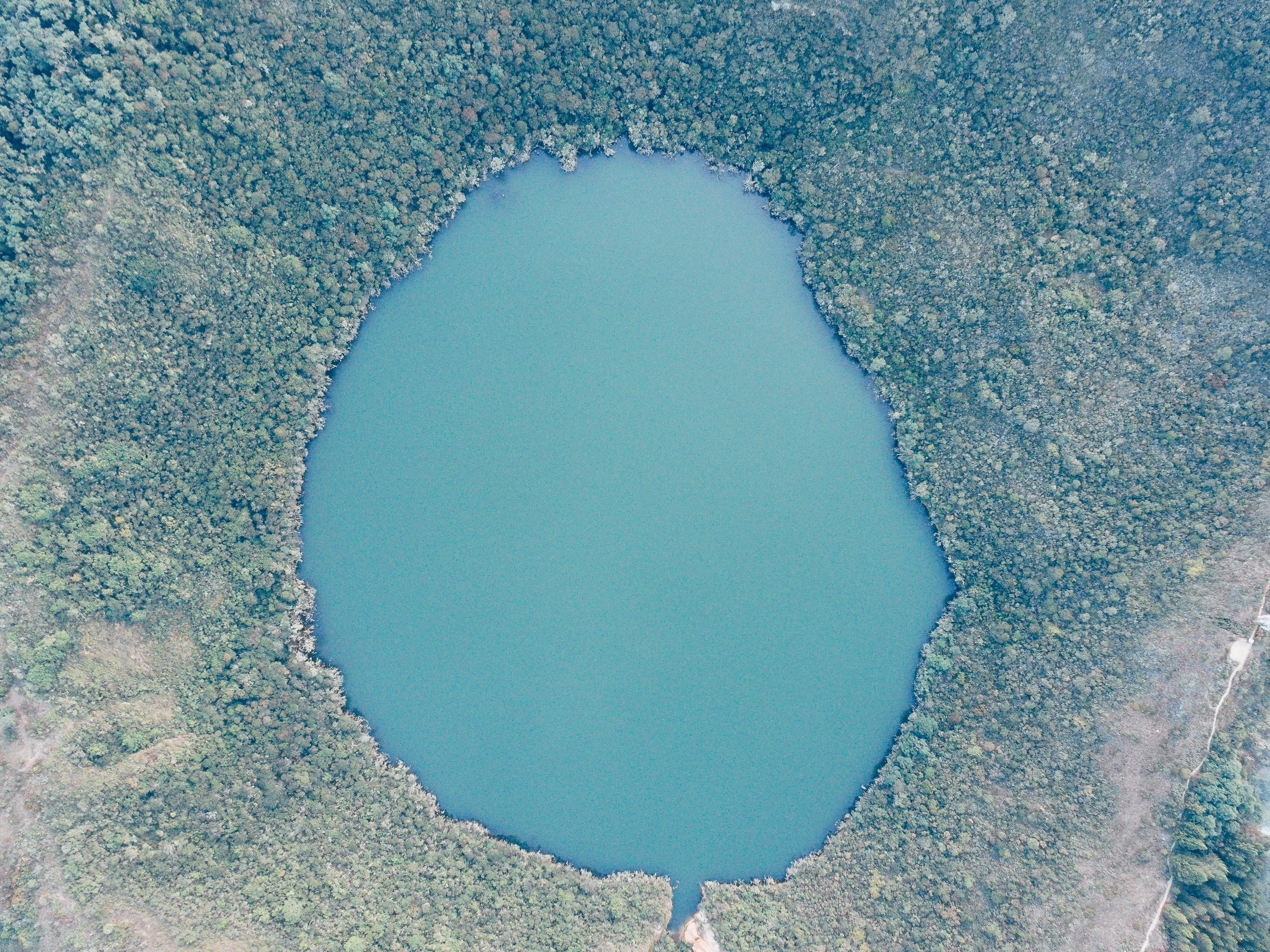 Guatavita desde el cielo